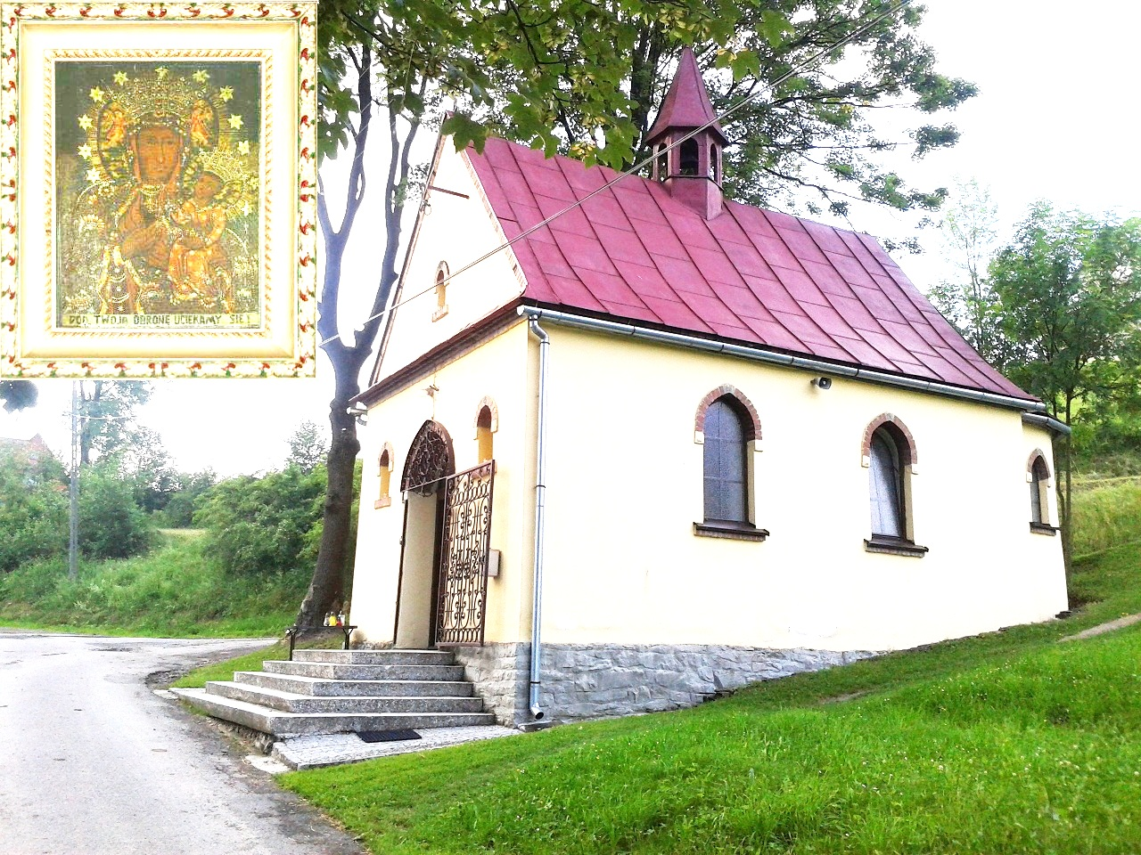 Logo Kaplicy